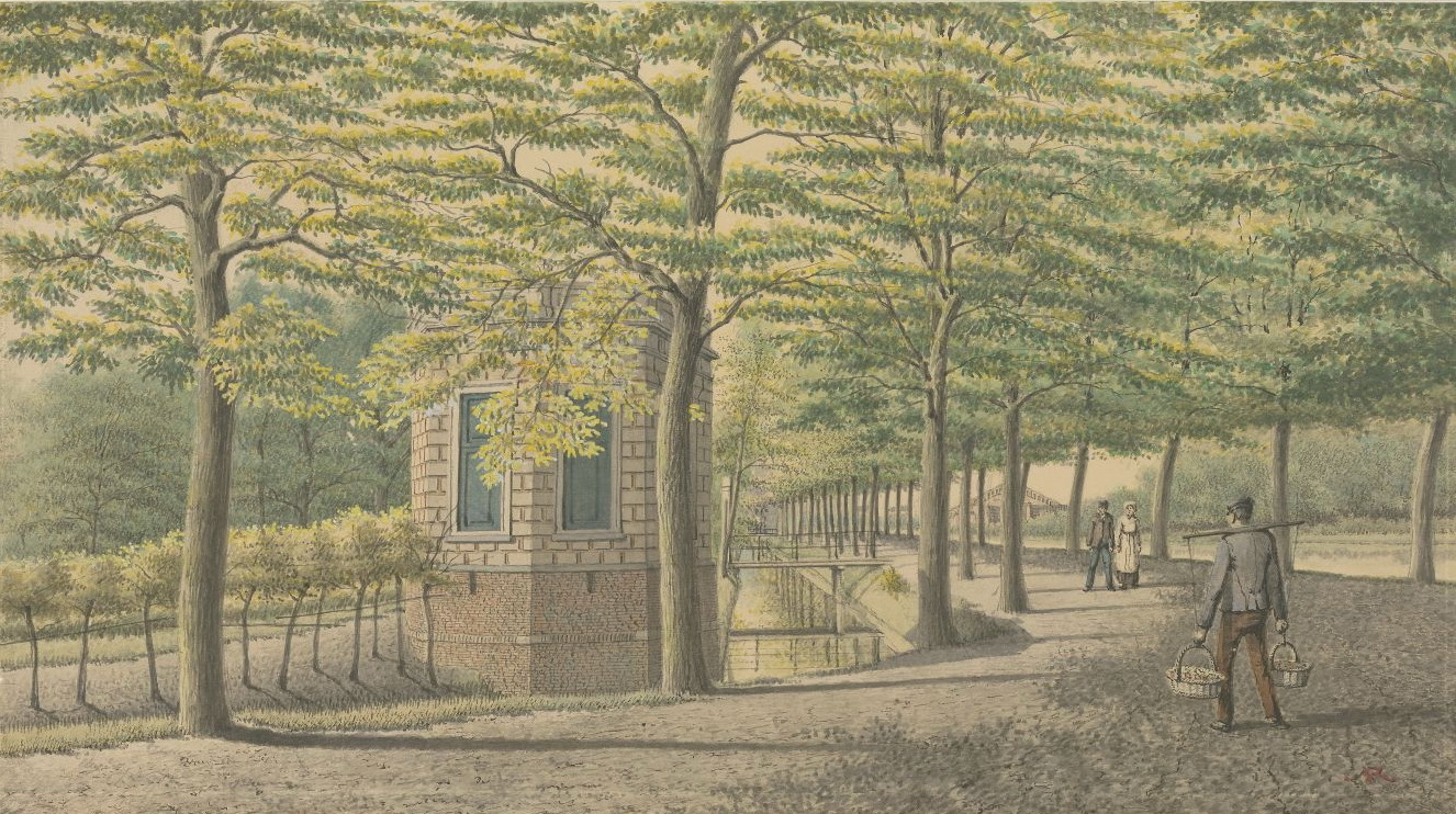 Koepel van Groenhoven aan de Witte Singel te Leiden. Tekening in kleur door Rieke, J.M.A., 1897.